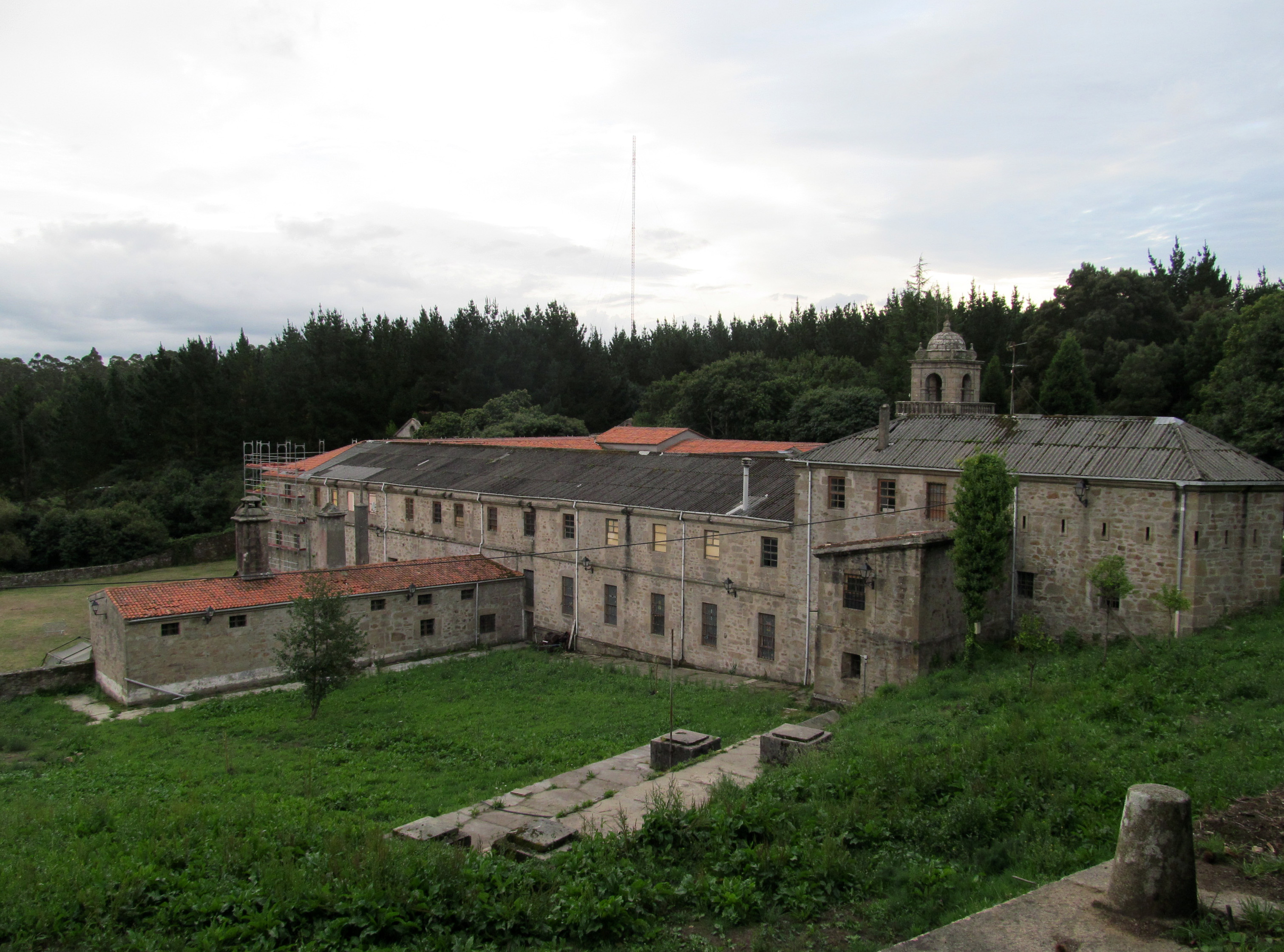 Monasterio de Santa Catalina de Montefaro (Ares) A Coruña, Galicia, España, en fase de restauración.El monasterio tiene un origen románico, a lo largo de la historia sufrió grandes modificaciones, la más grande fue en el siglo XVIII, dándole a la iglesia un aspecto barroco.